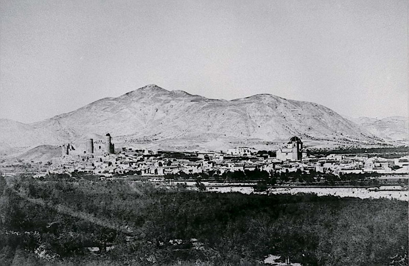 Panorámica de la ciudad tomada por Jacques Laurent por encargo de la Red nacional de Ferrocarriles